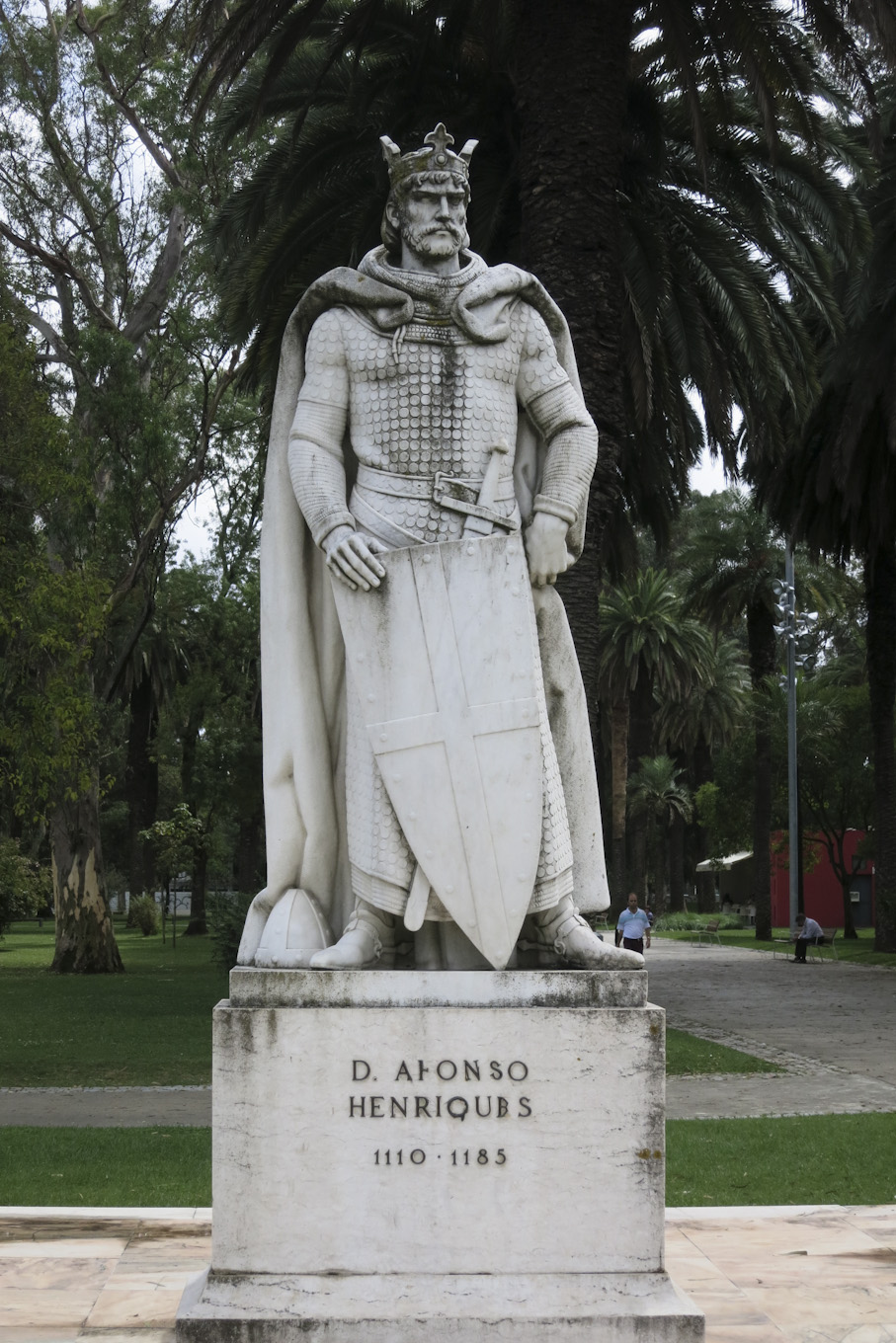 Leopoldo de Almeida, D. Afonso Henriques, 1950, Campo Grande, Lisboa